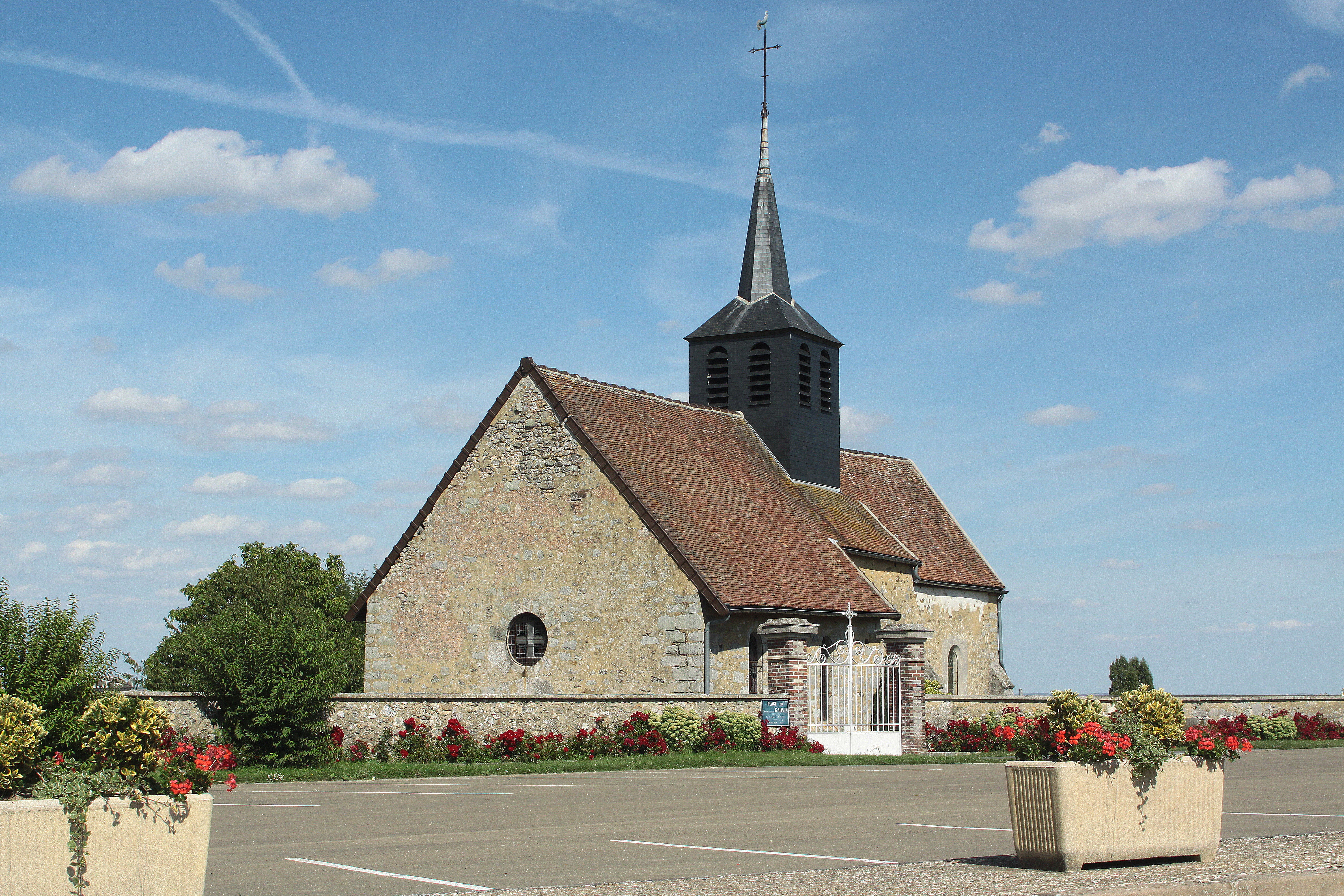 D'Kapell beim Marne-Monument